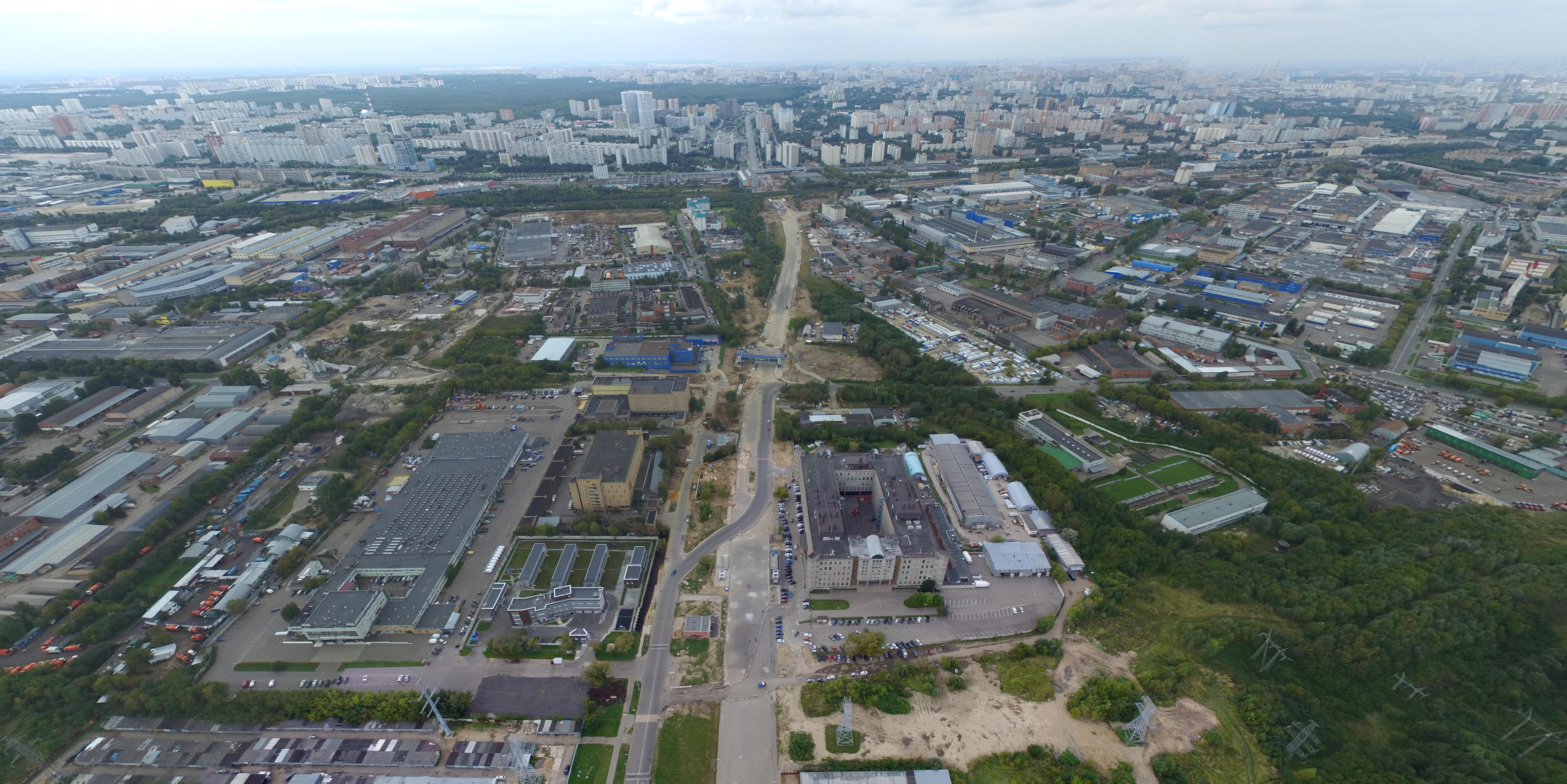 Южная рокада 2